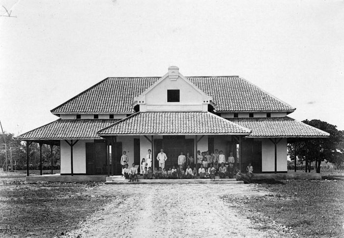 Repronegatief. Vooraanzicht van het hulpziekenhuis te Pareredja, Oost-Java.